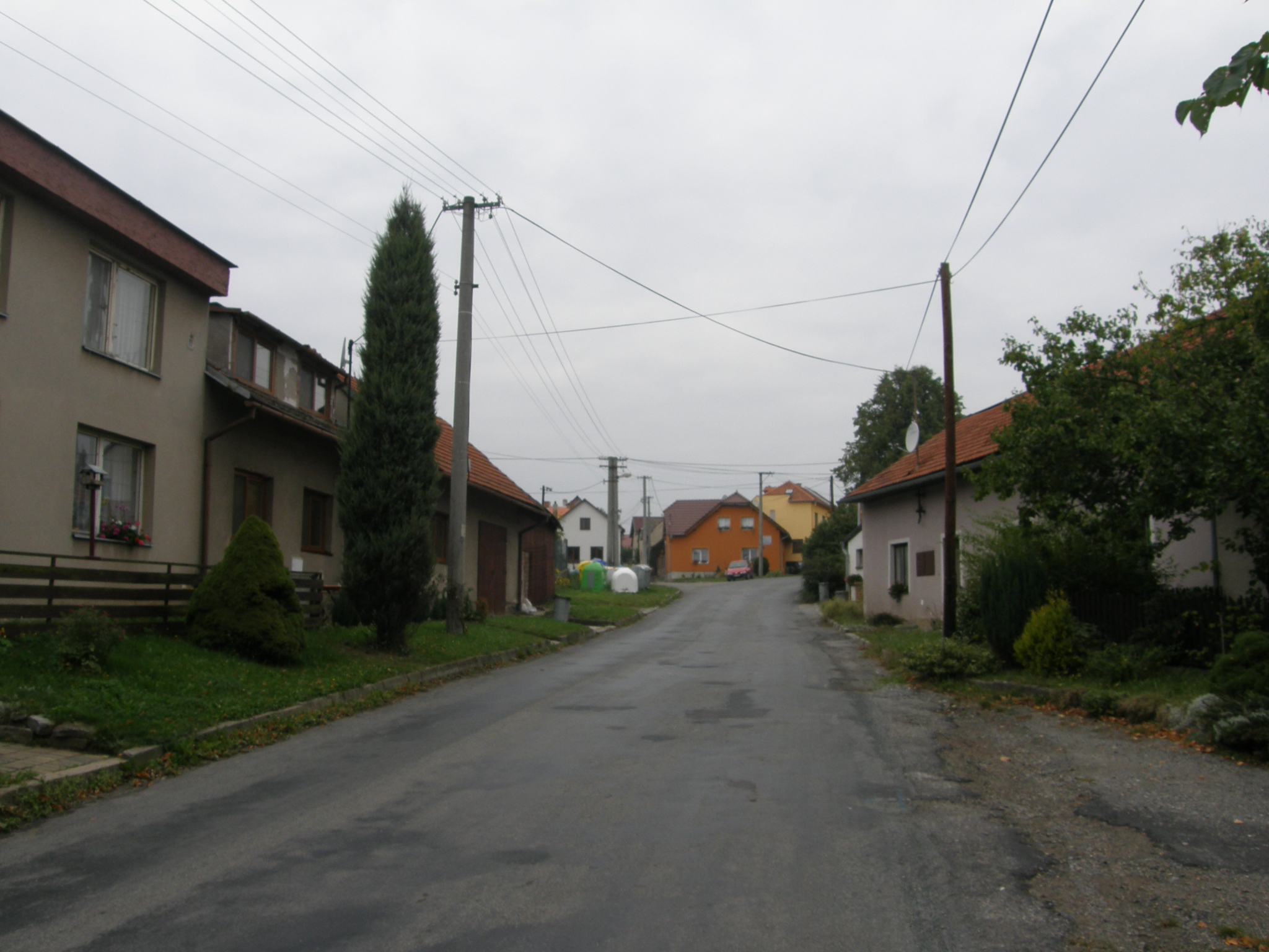 Štěchov